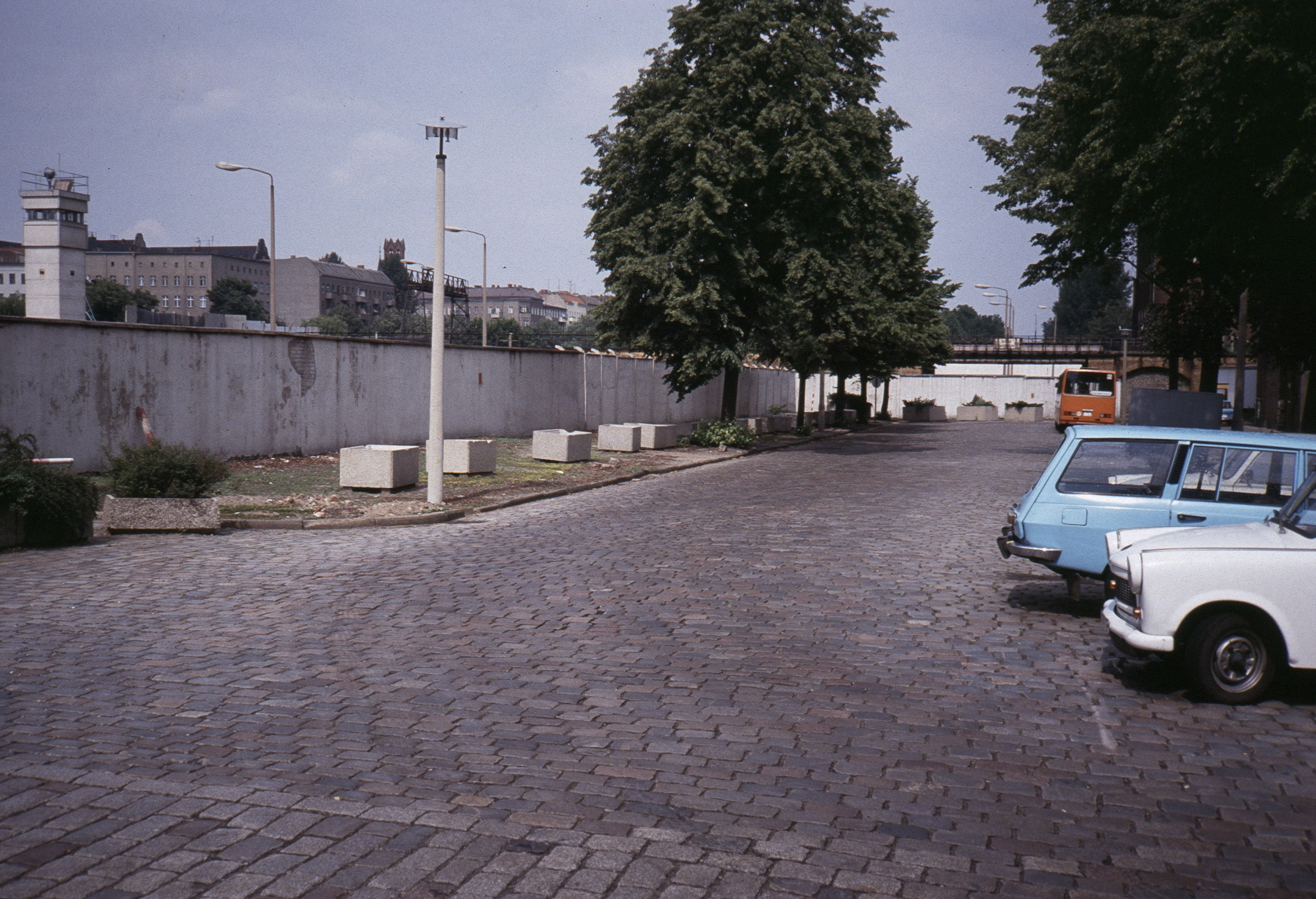 Lohmühlenstraße Berlin-Treptow